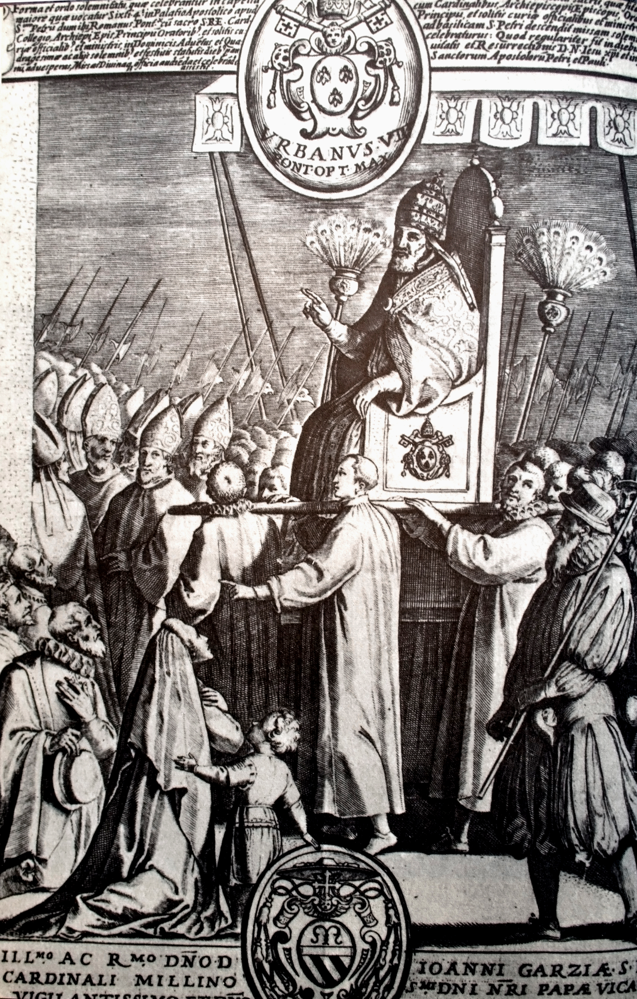 Cortege de l'Année Sainte. Le pape Urbaine VIII sur la sedia gestatoria